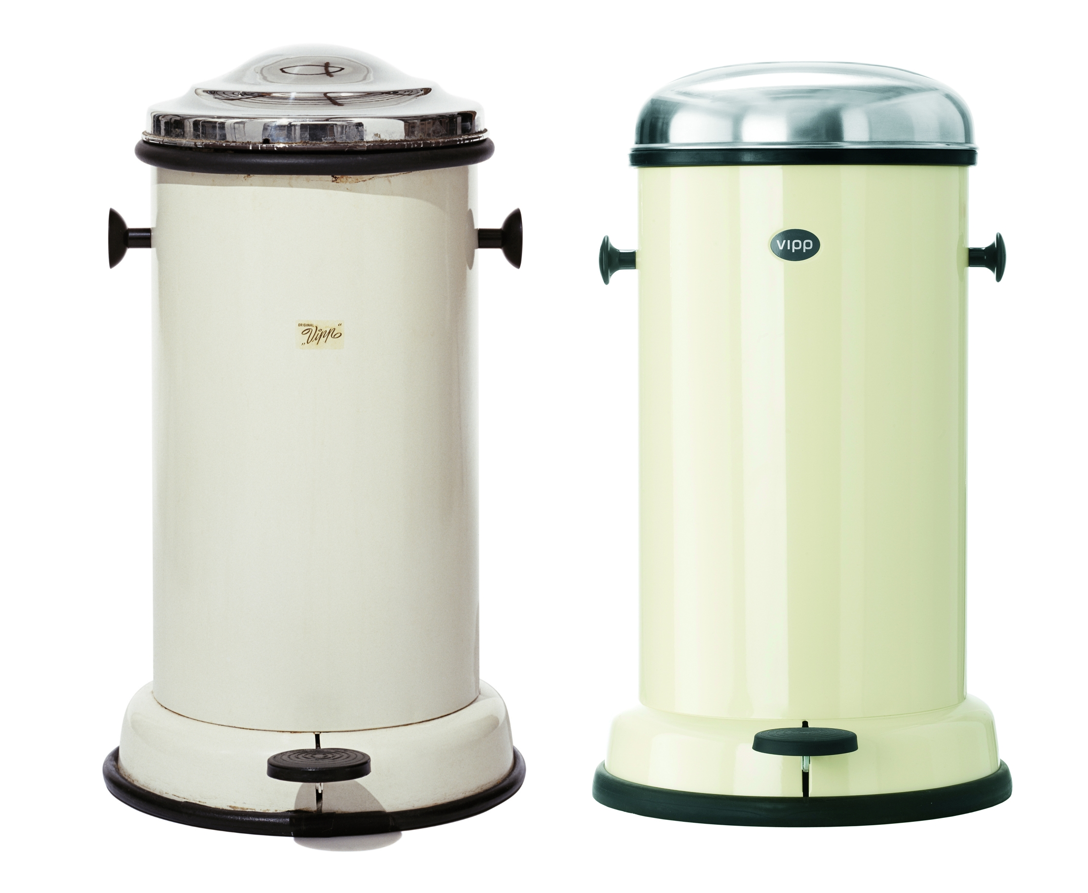 A gauche, la première poubelle Vipp. A droite, une poubelle Vipp actuelle, modèle "Vipp 15" de couleur crème.